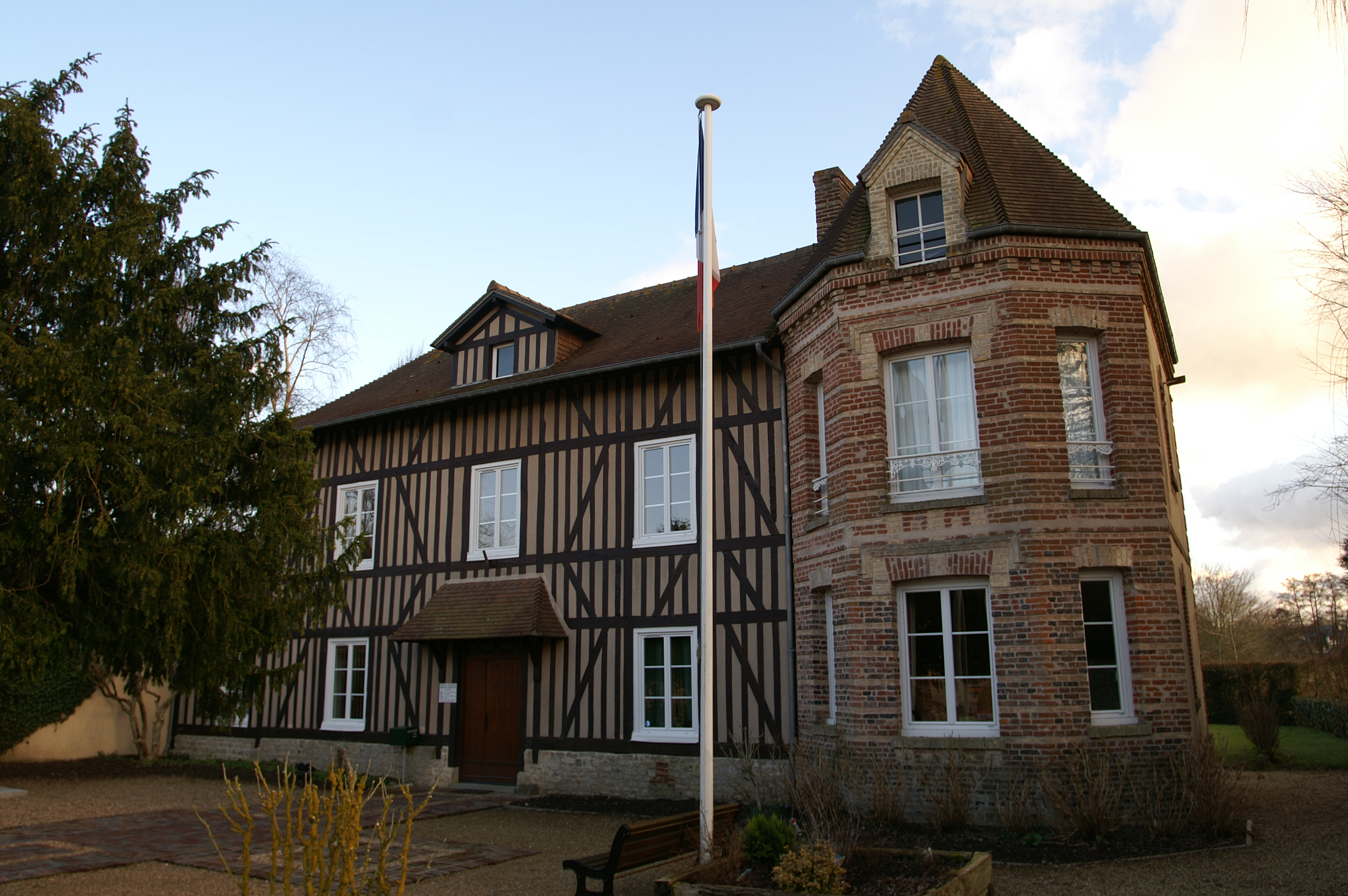 Mairie de Tourgéville.